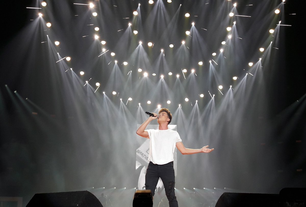 Raoul Vázquez canta en el Wizink Center de Madrid, CCME Fan edition, evento de Coca Cola donde canto Estare Ahí, Perfect y Million Reasons.